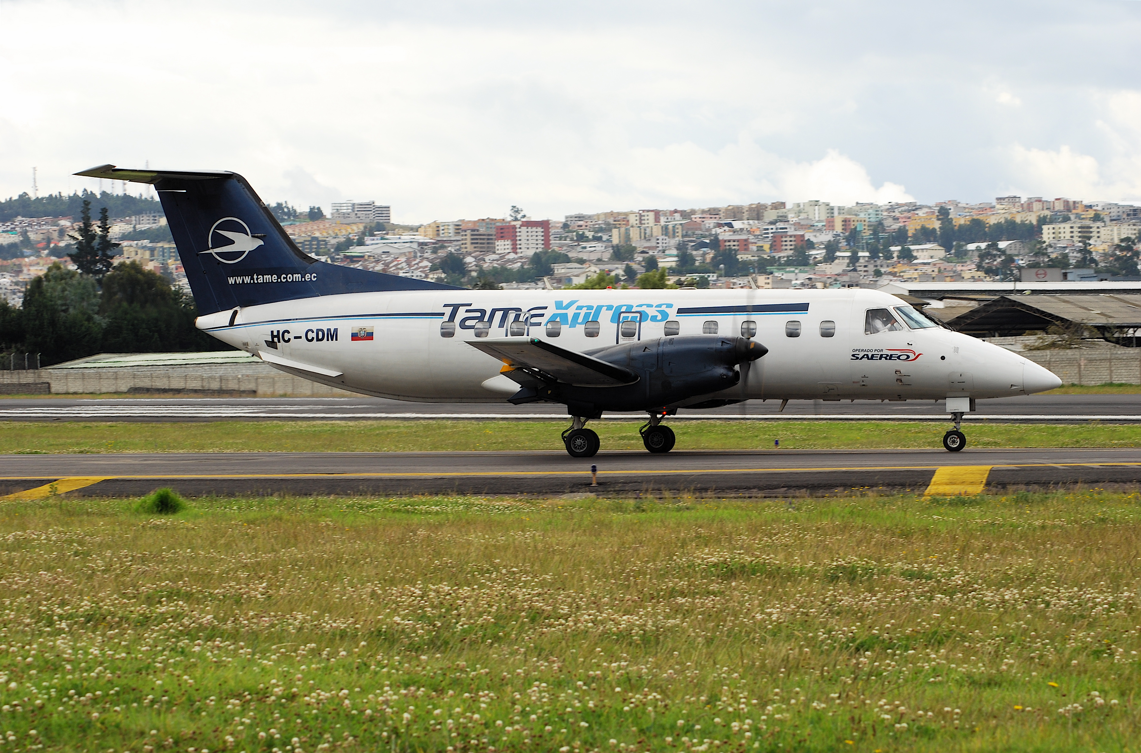 HC-CDM@UIO;23.06.2008/515cn